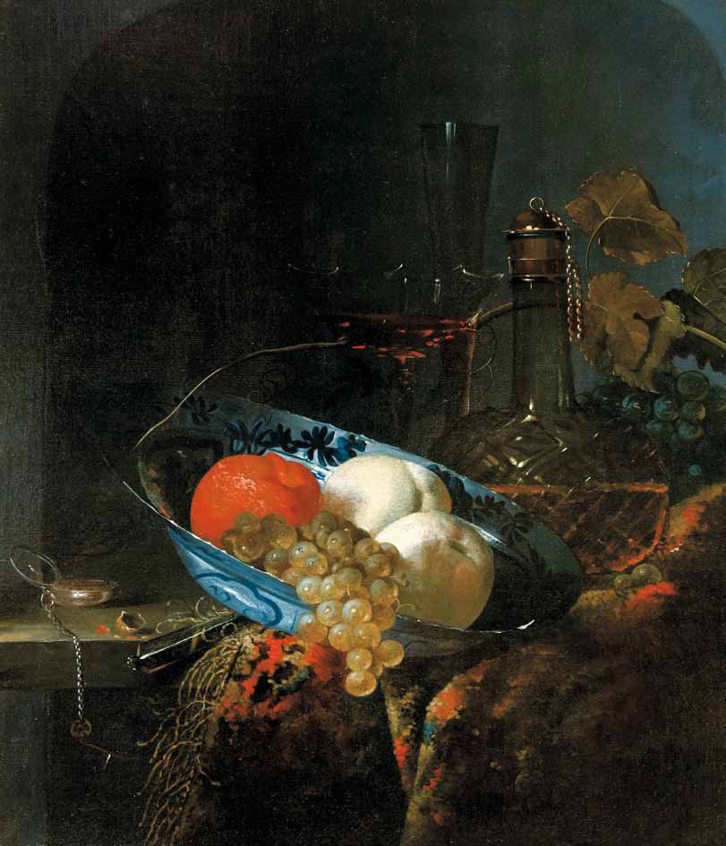 Bodegón con plato chino, firmado BVDermeer 1685, óleo sobre lienzo, 62,3 x 53,4 cm, colección privada